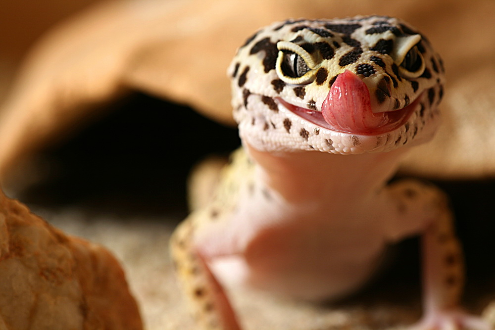 Eublepharis macularius